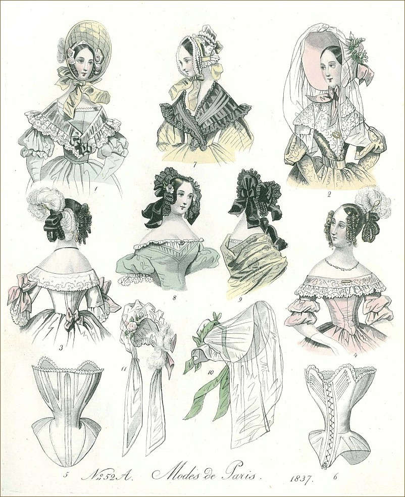 Oryginalny opis z magazynu: Fig. 1. Kapotka watowana atłasowa, ozdobiona piórami, pod kapotką róże gazowane. Suknia z renversem, blondyną obszytym. Fig. 2. Kapelusz atłasowy z pół-voalem gaz-blondynowym gładkiem, ozdobiony liściami winnemi atłasowemi; chusteczka haftowana muślinowa. Fig. 3. Ubranie głowy podług pana Smal: loki angielskie, marabuty i strzała złota. Fig. 4. Toż samo ubranie z innej strony. Fig. 5. Gorset podług kroju pana Josselin, ten gorset zowią á la Taglioni. Fig. 6. Tenże sam gorset, z innej strony. Fig. 7. Czepeczek negliżowy tiulowy, przystrojony wstążkami; chusteczka czarna tiulowa. Fig. 8. Czepeczek aksamitny czarny garnirowany koronkami i przystrojony różą polną. Fig. 9. Tenże sam czepeczek z innej strony. Fig. 10. Kapelusz biały atłasowy, przystrojony atłasem i kiteczką z liści aksamitnych, woal gazowy. Fig. 11. Czepeczek z blondyny gładkiej, przystrojony różą centifolią i marabutami.